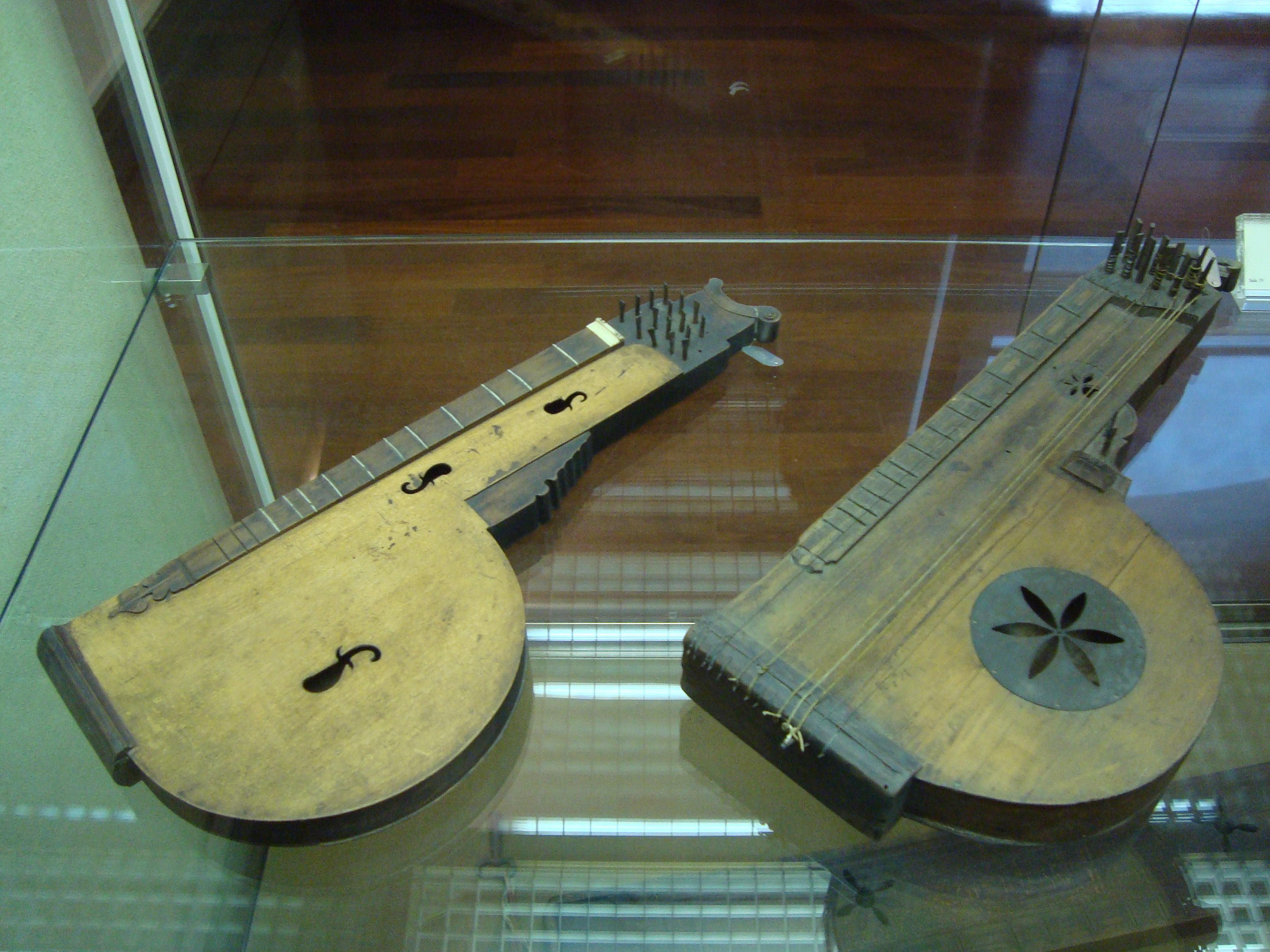 Epinettes des Vosges, Museo Nazionale degli Strumenti Musicali di Roma